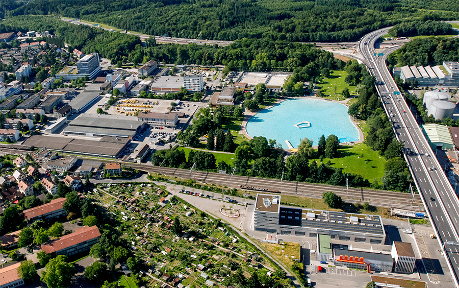 Die Freizeitanlage Weyermannshaus in Bern, umgeben vom Untermattquartier, dem Bremgartenwald und dem Autobahnviadukt Weyermannshaus.